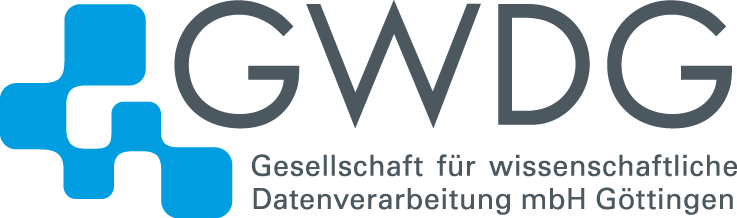 Das neue Logo der GWDG seit Herbst 2012